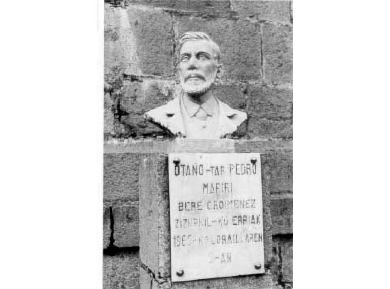 Pedro Mari Otaño bertsolariaren omenez Zizurkilen jarritako irudia